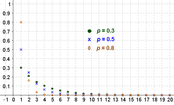 PDF Геометриска распределба p=0.3,0.5 и 0.8